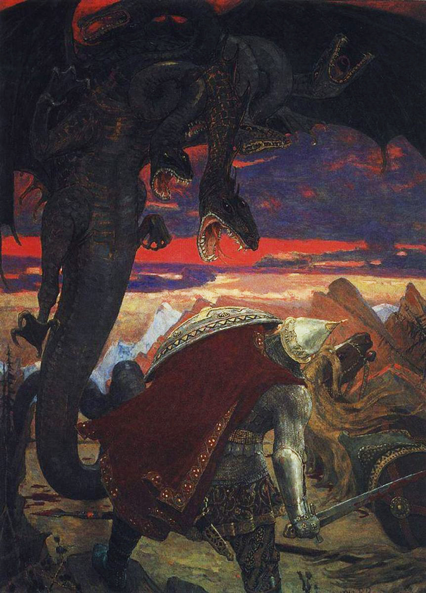 Бой Добрыни Никитича с семиглавым Змеем Горынычем